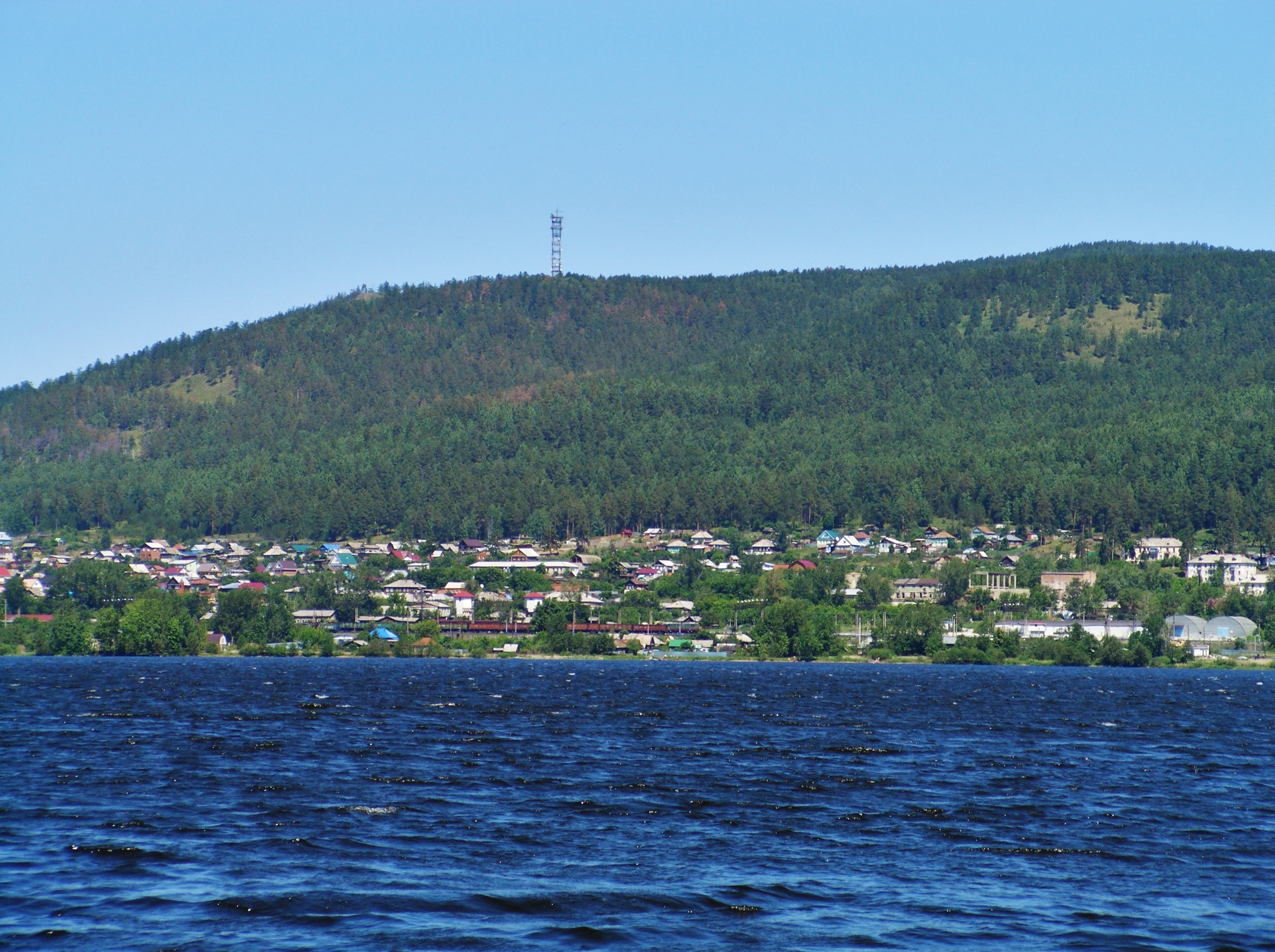 Ильменское озеро.